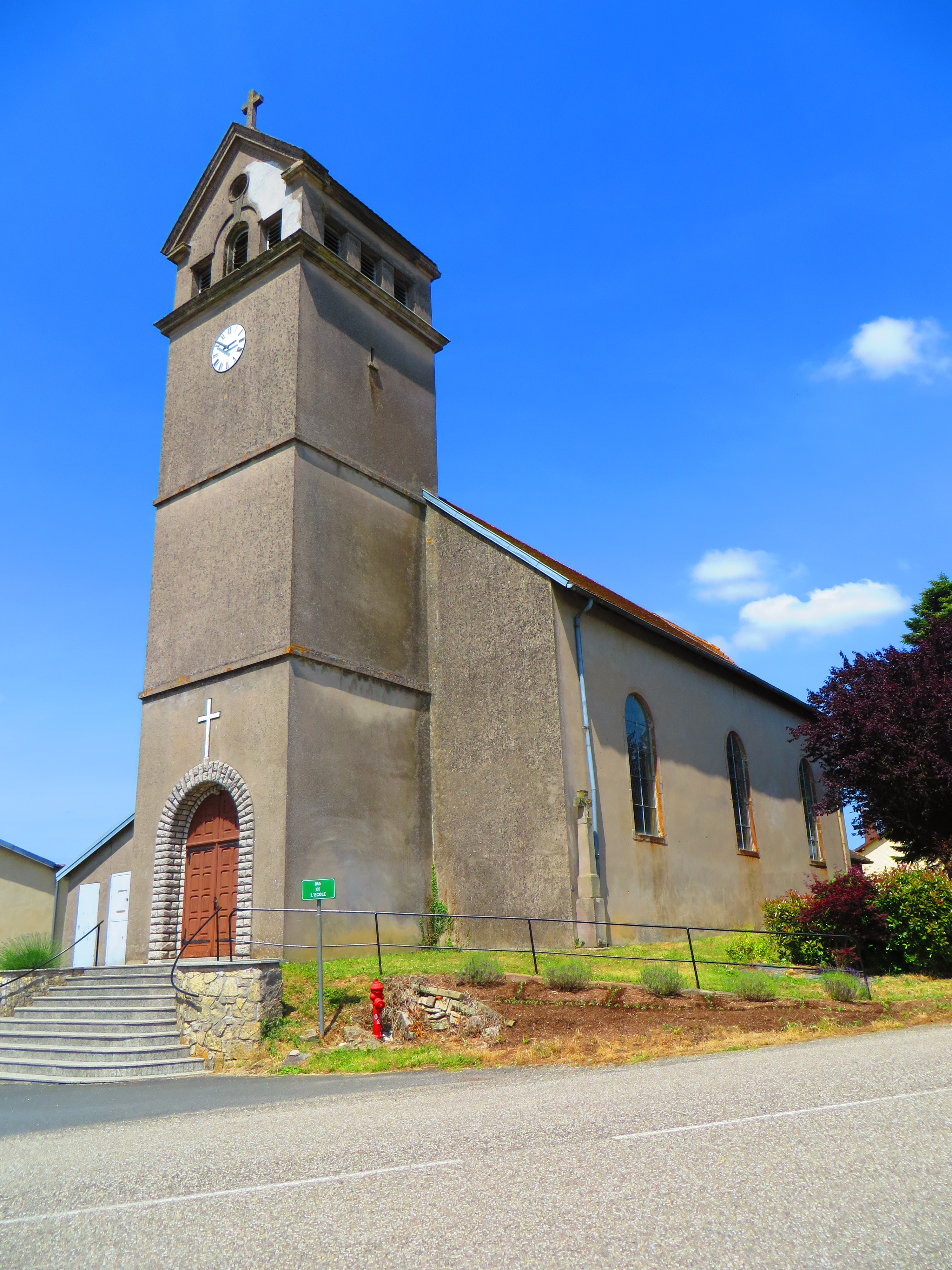 Ibigny eglise